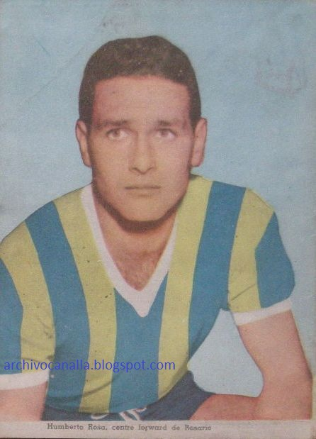 Humberto "Coco" Rosa